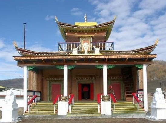 Дацан в Санаге